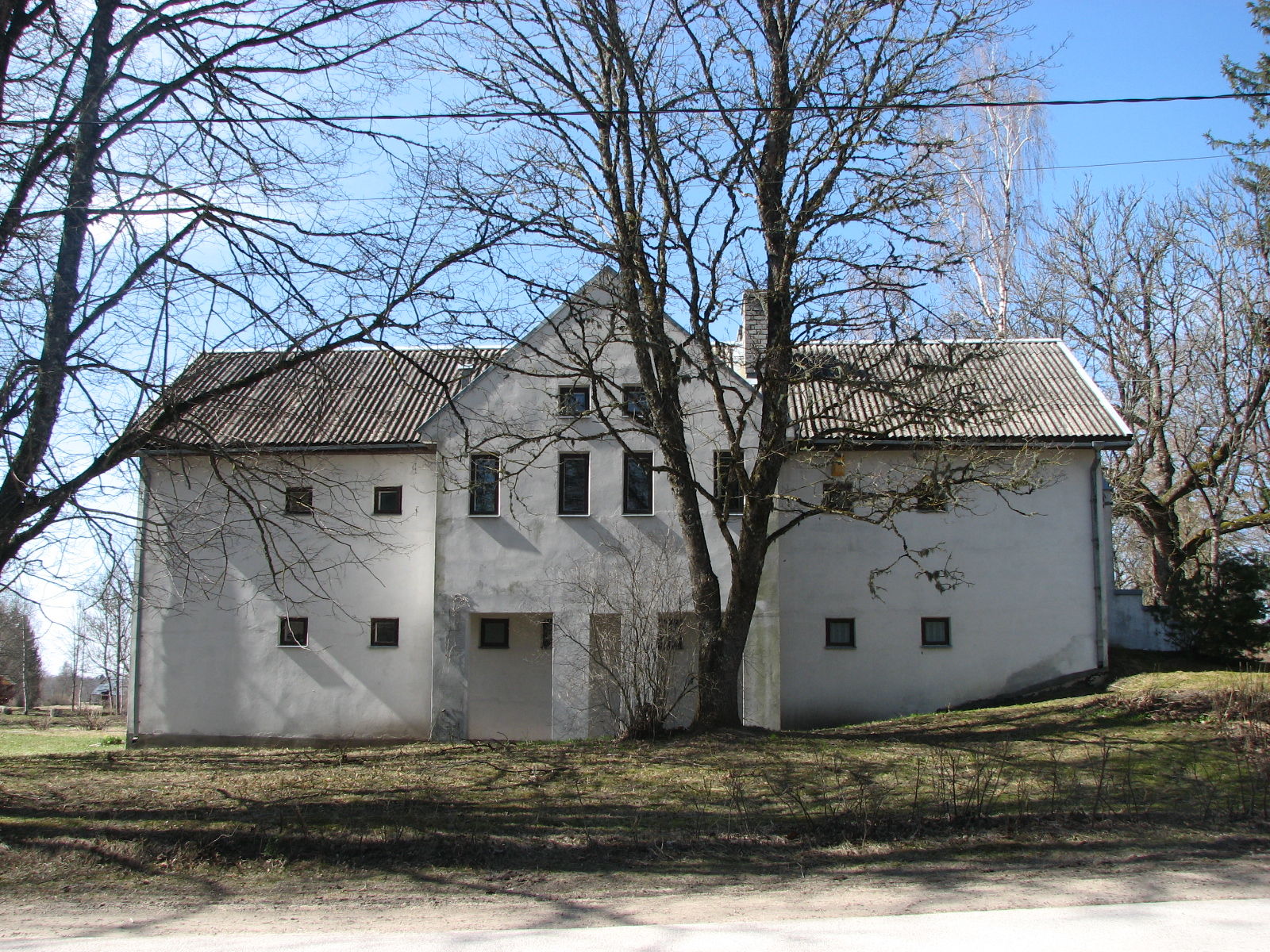 Kullamaa uus pastoraadihoone